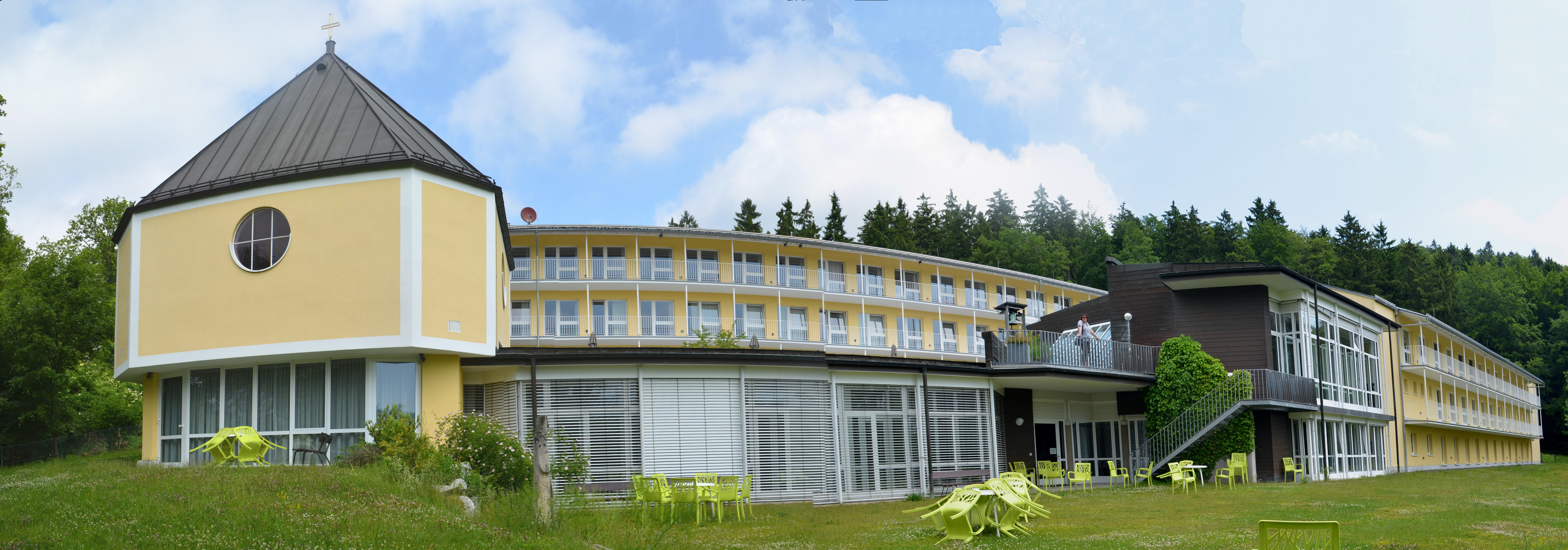 Arnoldshain, Evangelische Akademie, Panorama